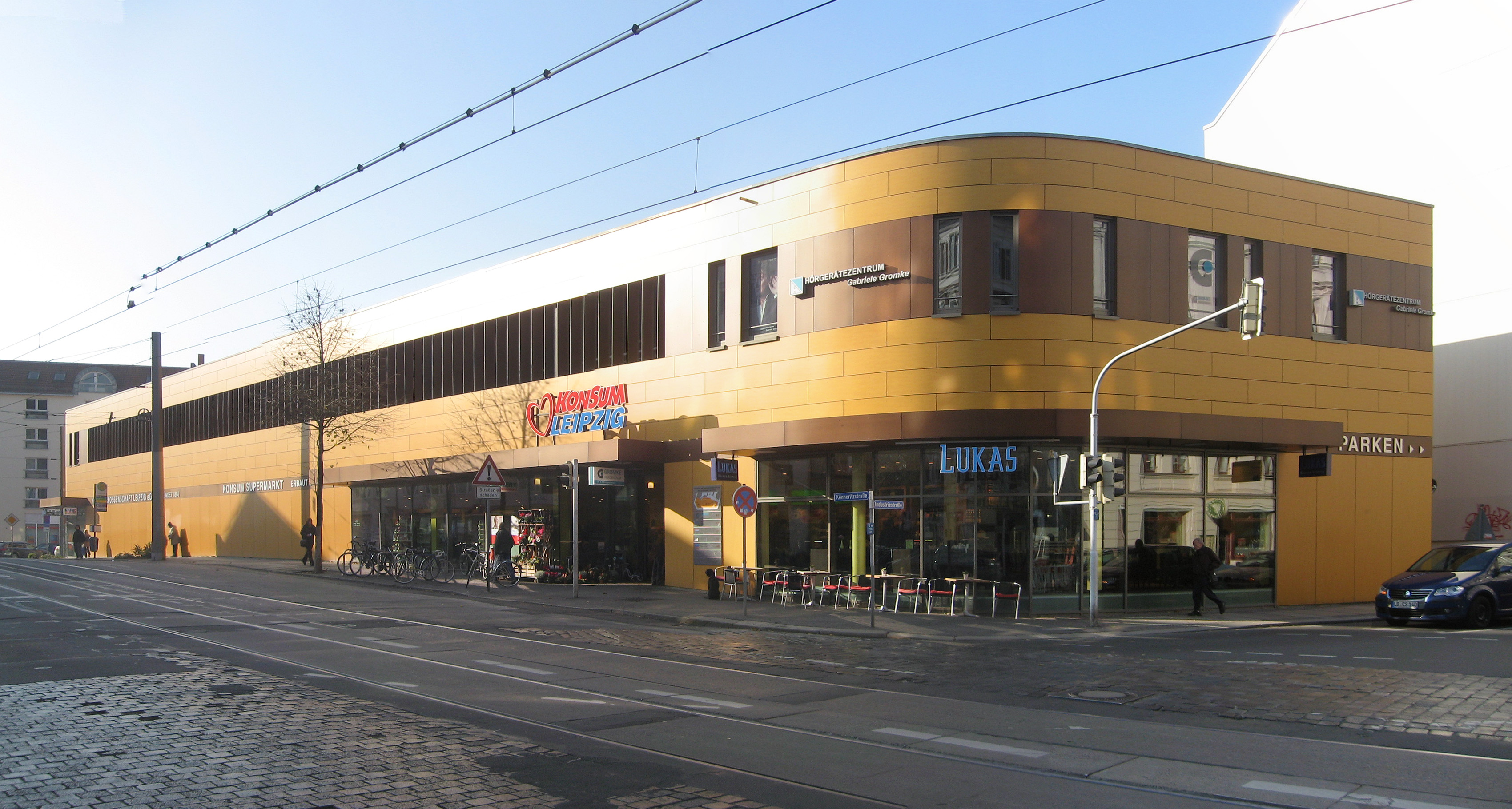 Konsum-Supermarkt in Leipzig-Schleußig, Könneritzstraße 50–50a (erbaut 2008), Ansicht von Nordosten